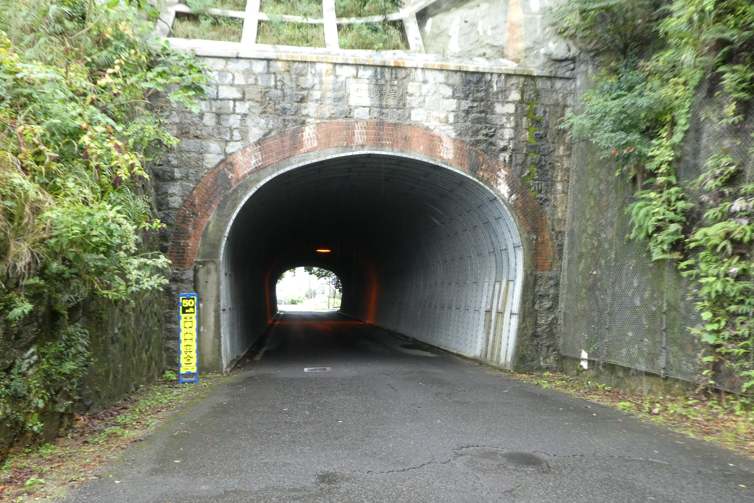 琴平参宮電鉄多度津線の岩崎隧道跡。大麻駅 - 大麻神社前駅間。大麻側。